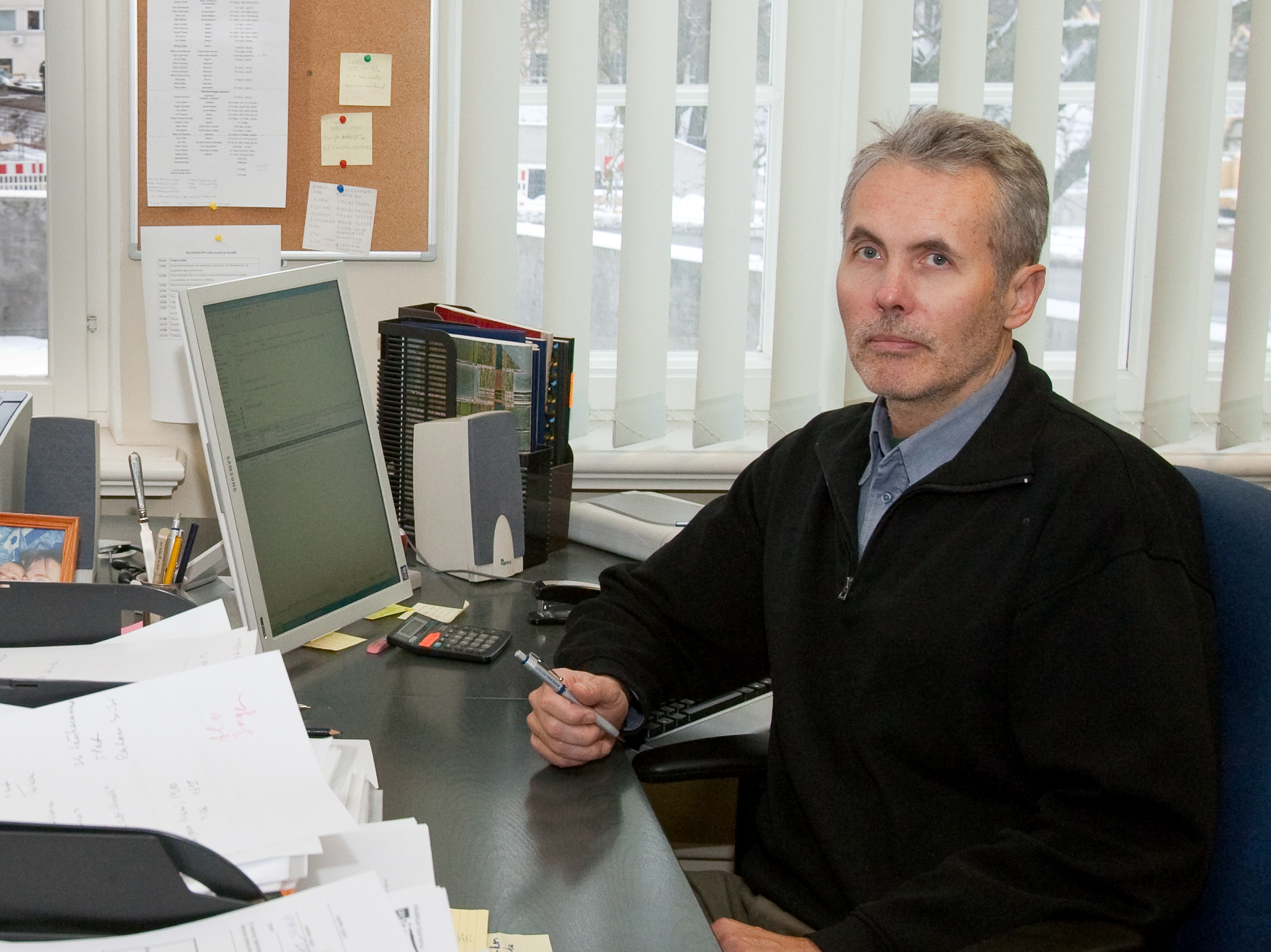 Tartu Ülikooli bioloogilise mitmekesisuse tippkeskuse (FIBIR) juhataja professor Martin Zobel.